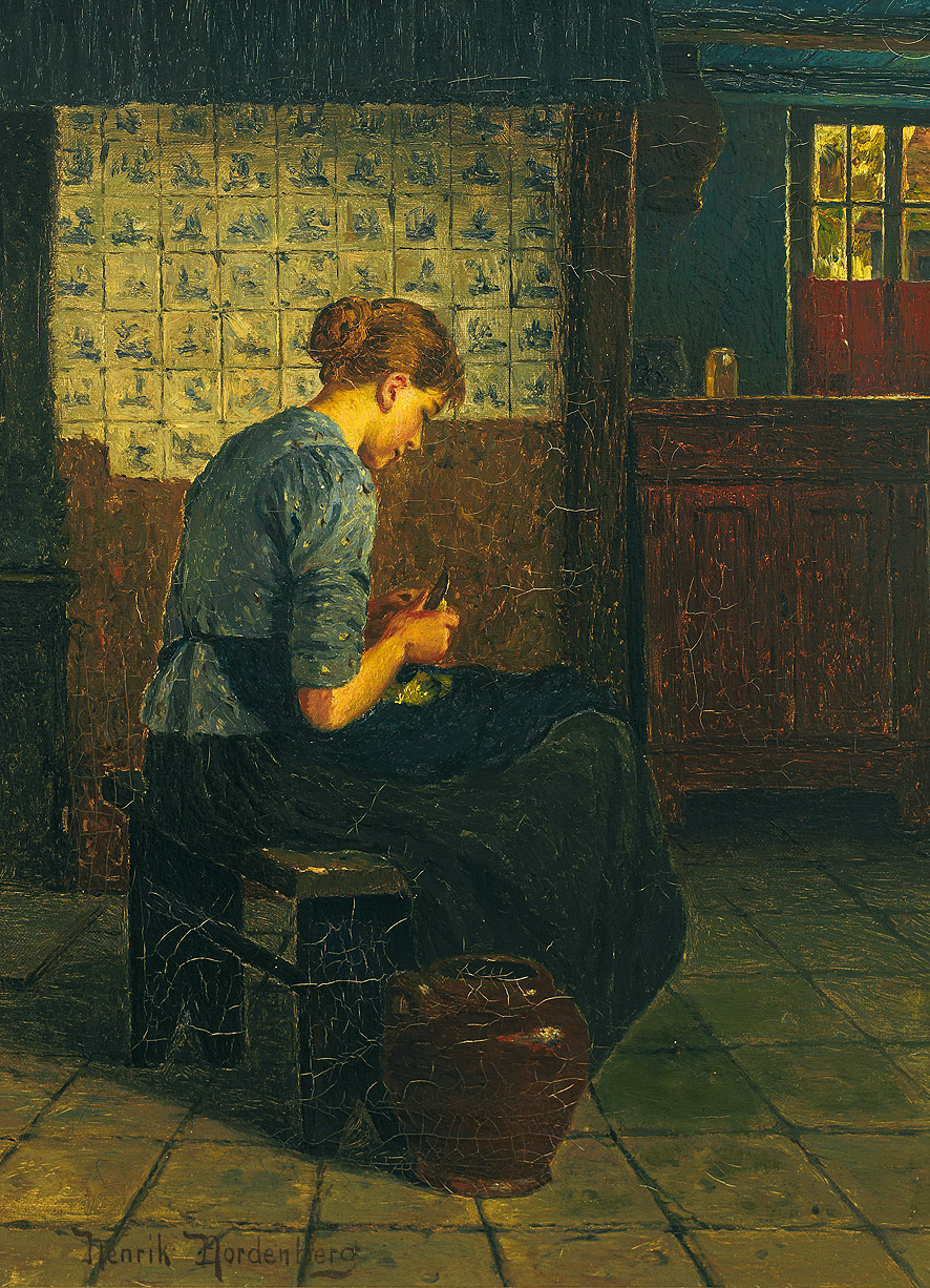 Sitzende junge Frau in holländischer Küche.